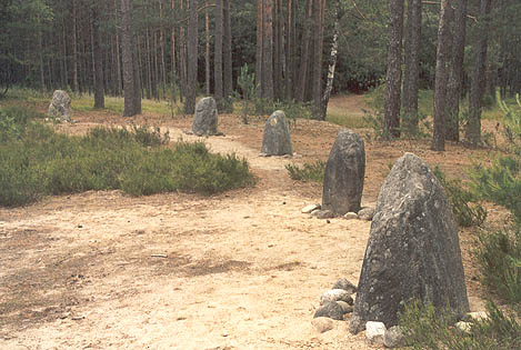 Kamienny krą…g w Grzybnicy, Polska. Fot. Agnieszka Kwiecień Nova, 06.2004